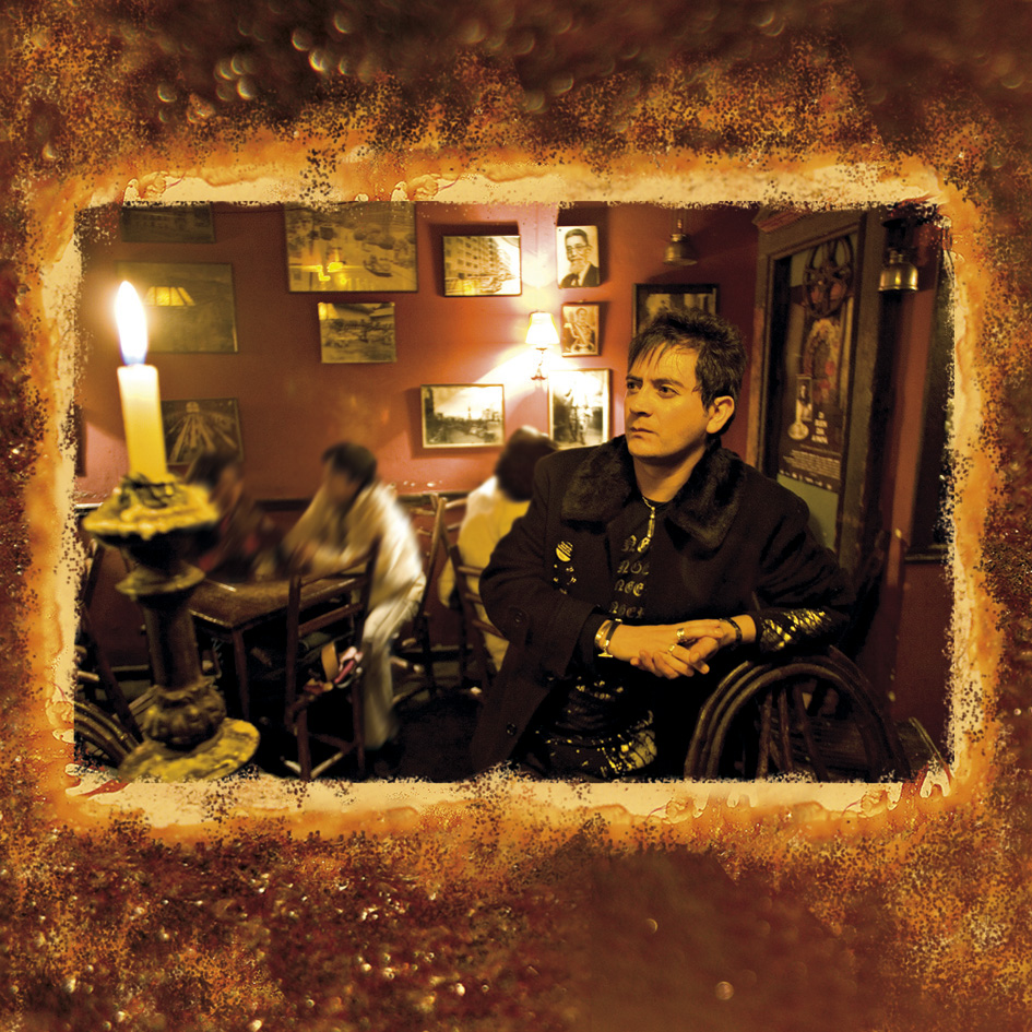 Sesión de fotos para el disco Lapsus banda ancha 2007